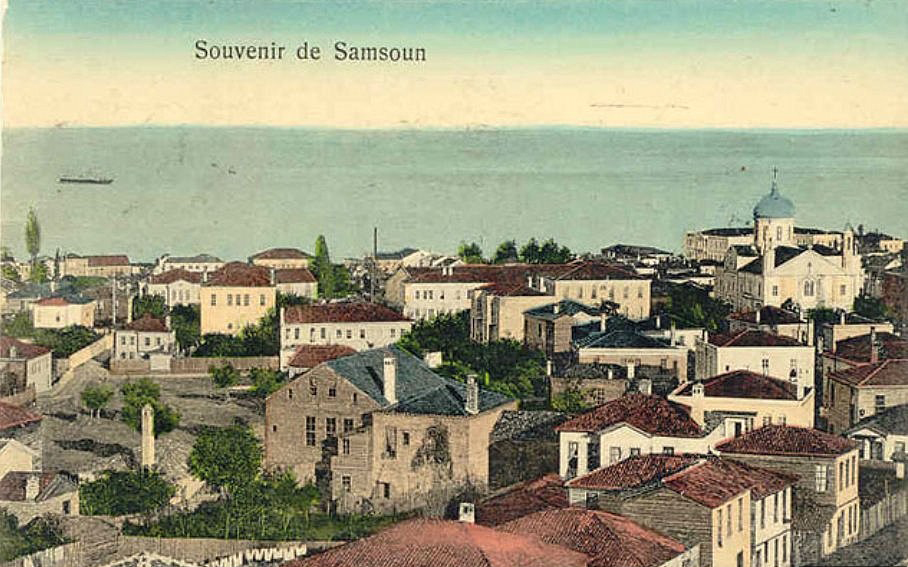 Günümüzde Kale Mahallesi olarak anılan bölgenin kartpostal üzerine yapılmış bir resmi. Sağ tarafta artık var olmayan Aya Triada Grek Ortodoks Kilisesi görünüyor.